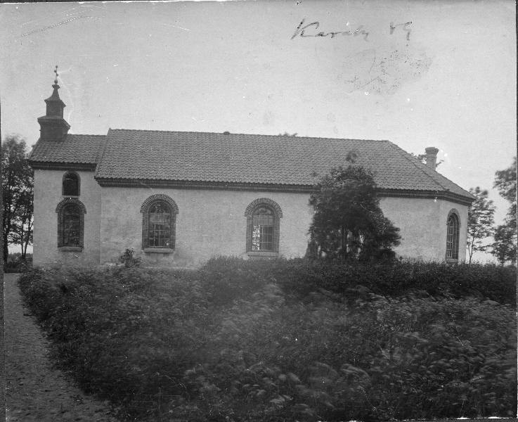 Kyrkan från söder (före branden 1919). Kategori: (01) ExteriörerKyrkan från söder (före branden 1919).